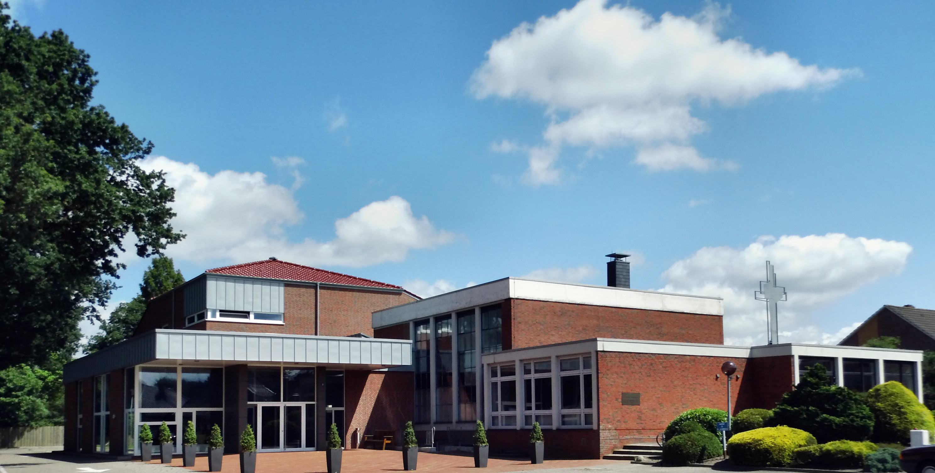 Baptistenkirche Remels (Gemeinde Uplengen, Landkreis Leer, Ostfriesland, Niedersachsen, Deutschland)